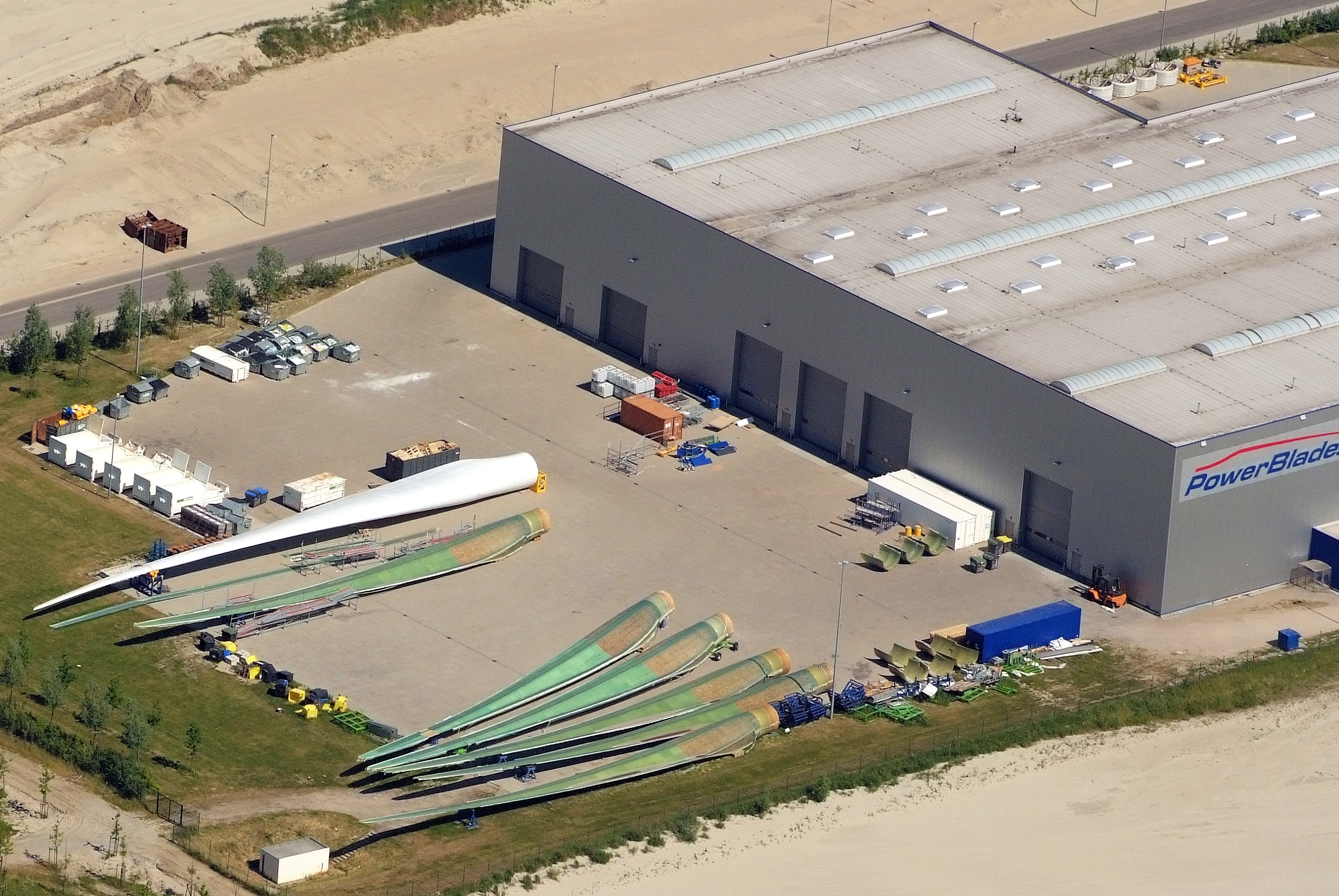 Rotoblätter auf dem Werksgelände der Power Blades GmbH Fotoflug vom Flugplatz Nordholz-Spieka über Cuxhaven und Wilhelmshaven